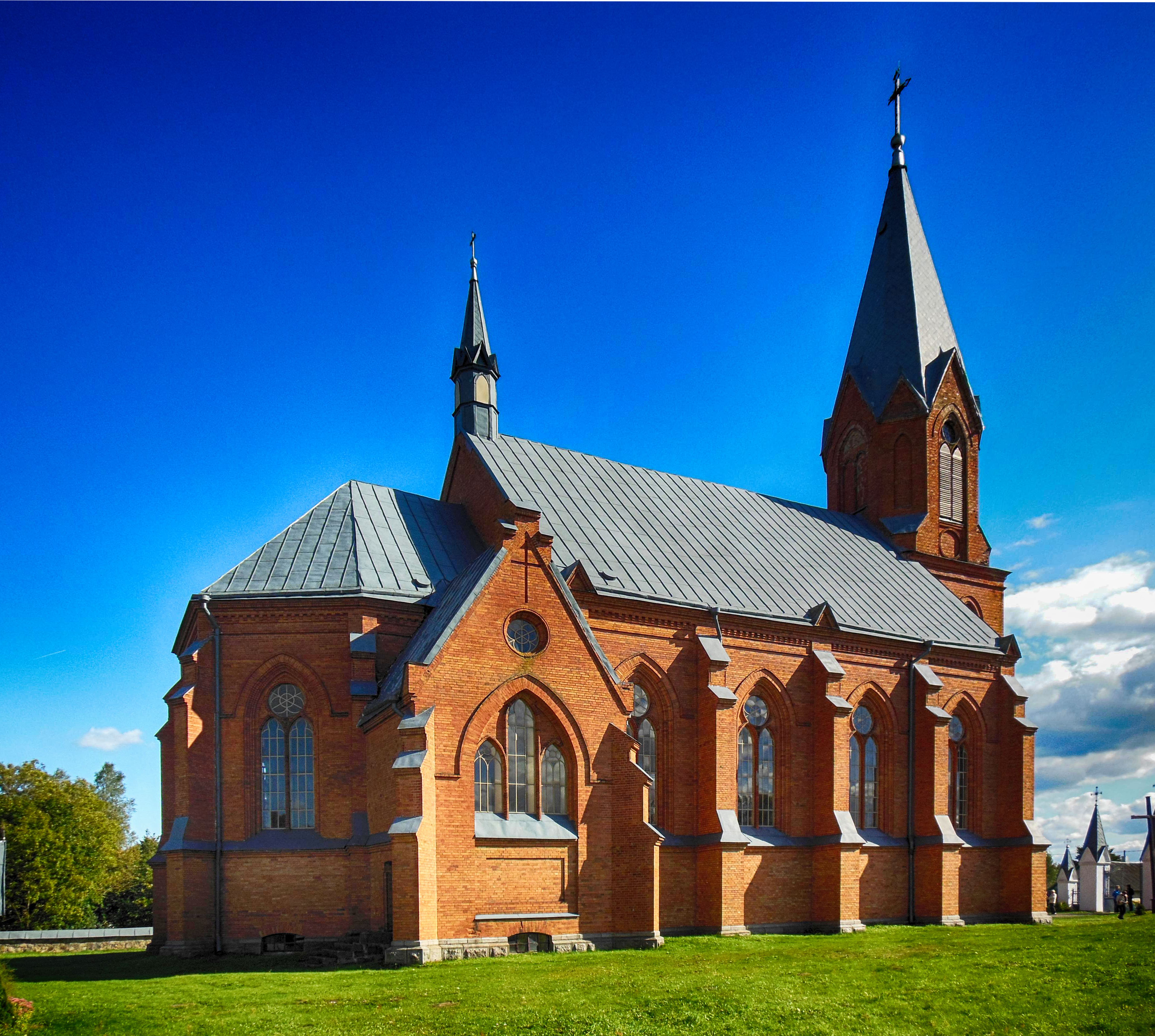 Касцёл св. Уладзіслава ў Суботніках Беларуская (тарашкевіца): Суботнікі, касьцёл сьв. Уладыслава